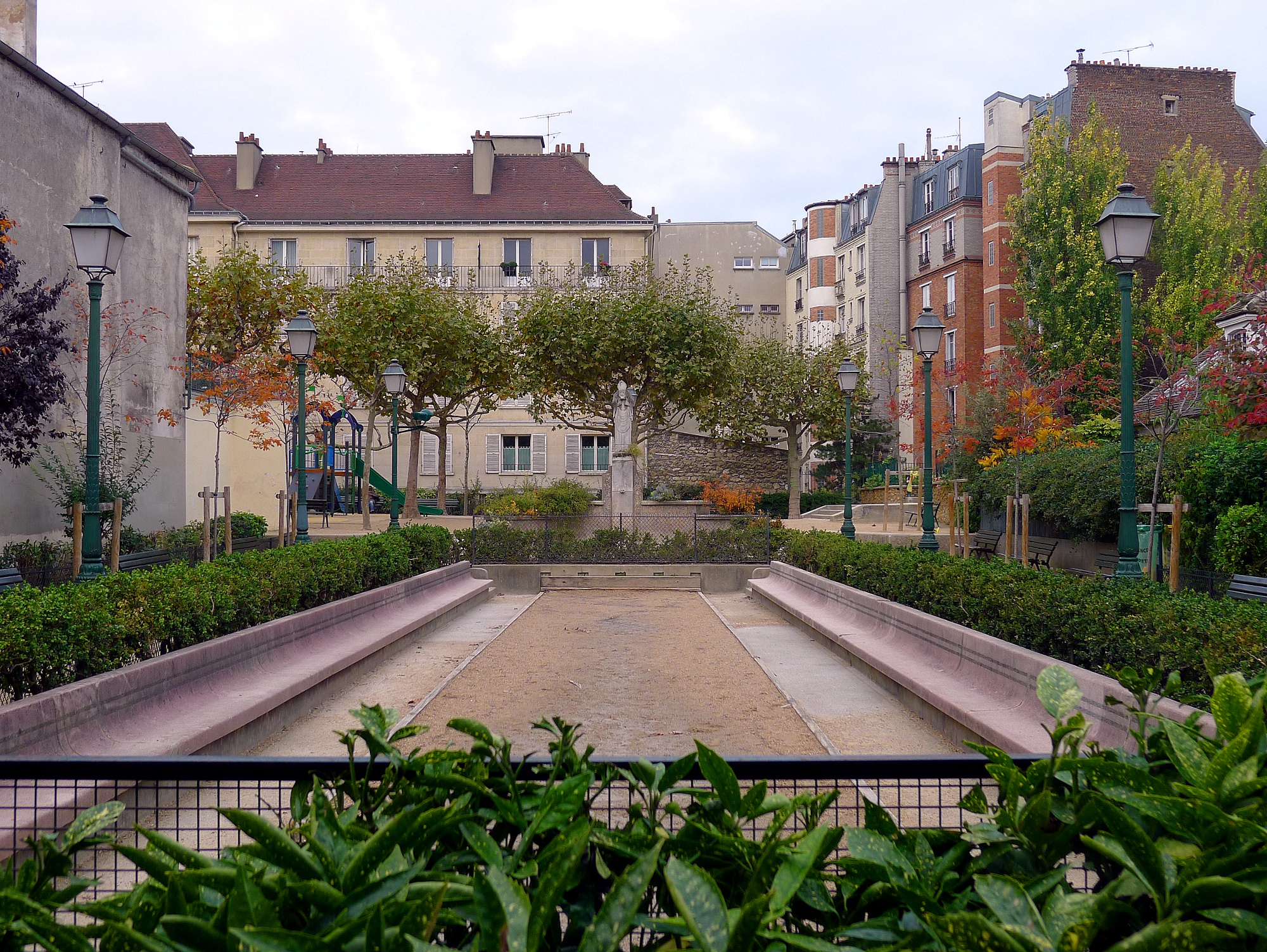 Square Suzanne-Buisson - Paris XVIII